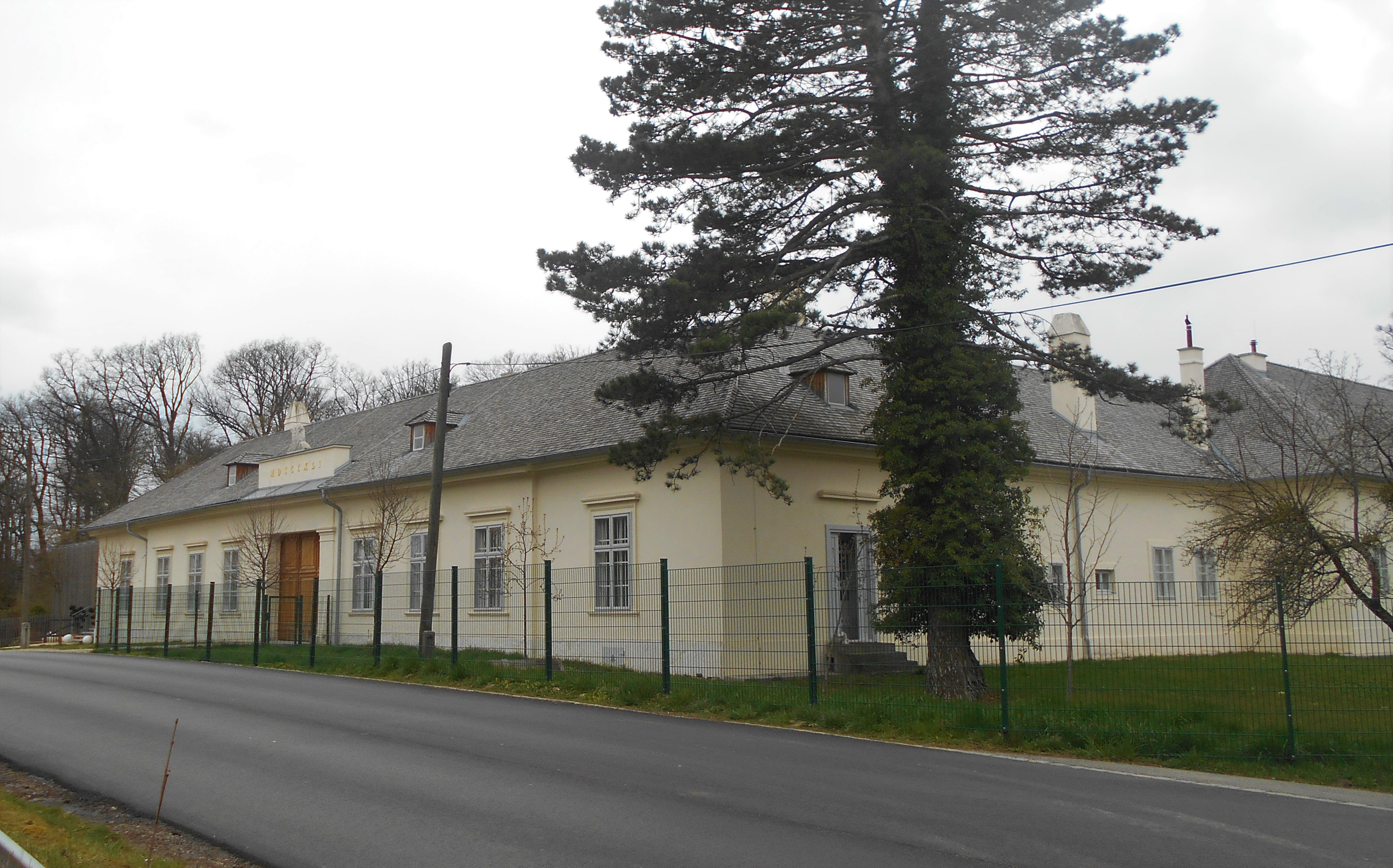 Wirtschaftshof des Schottenstiftes